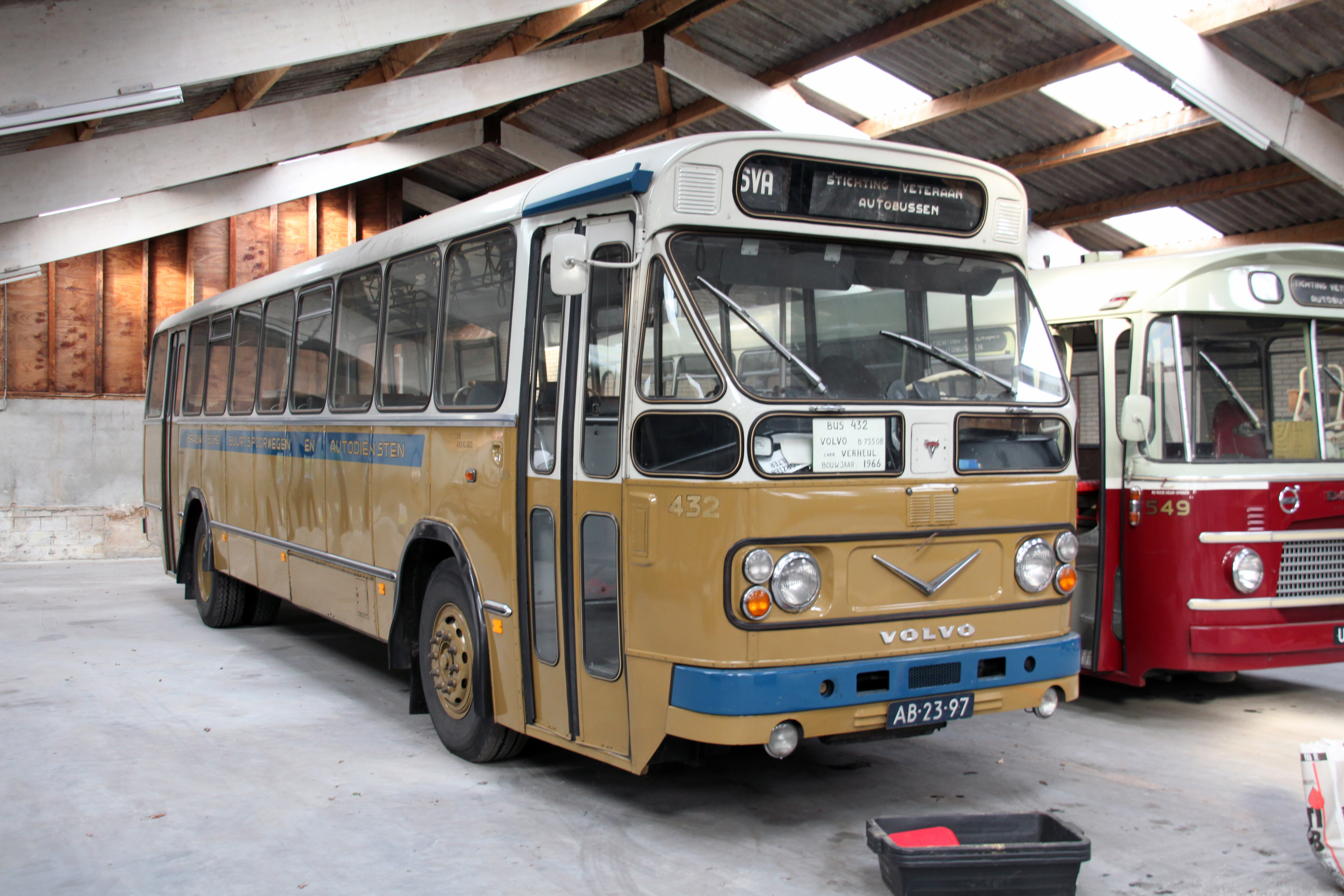 Streekbus 432 van de BBA uit de jaren 60 van het type Volvo B 75508 / Verheul, nu onderdeel van de collectie van de Stichting Veteraan Autobussen.